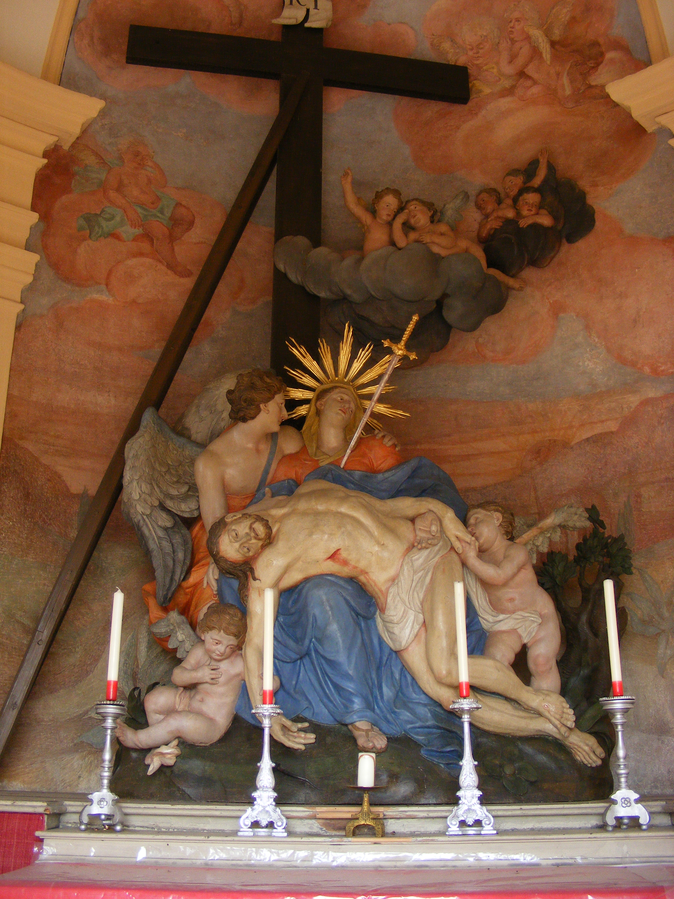 Pietà von Franz Schwanthaler, Schmerzenskapelle, Maria Plain, Bergheim, Land Salzburg, Österreich